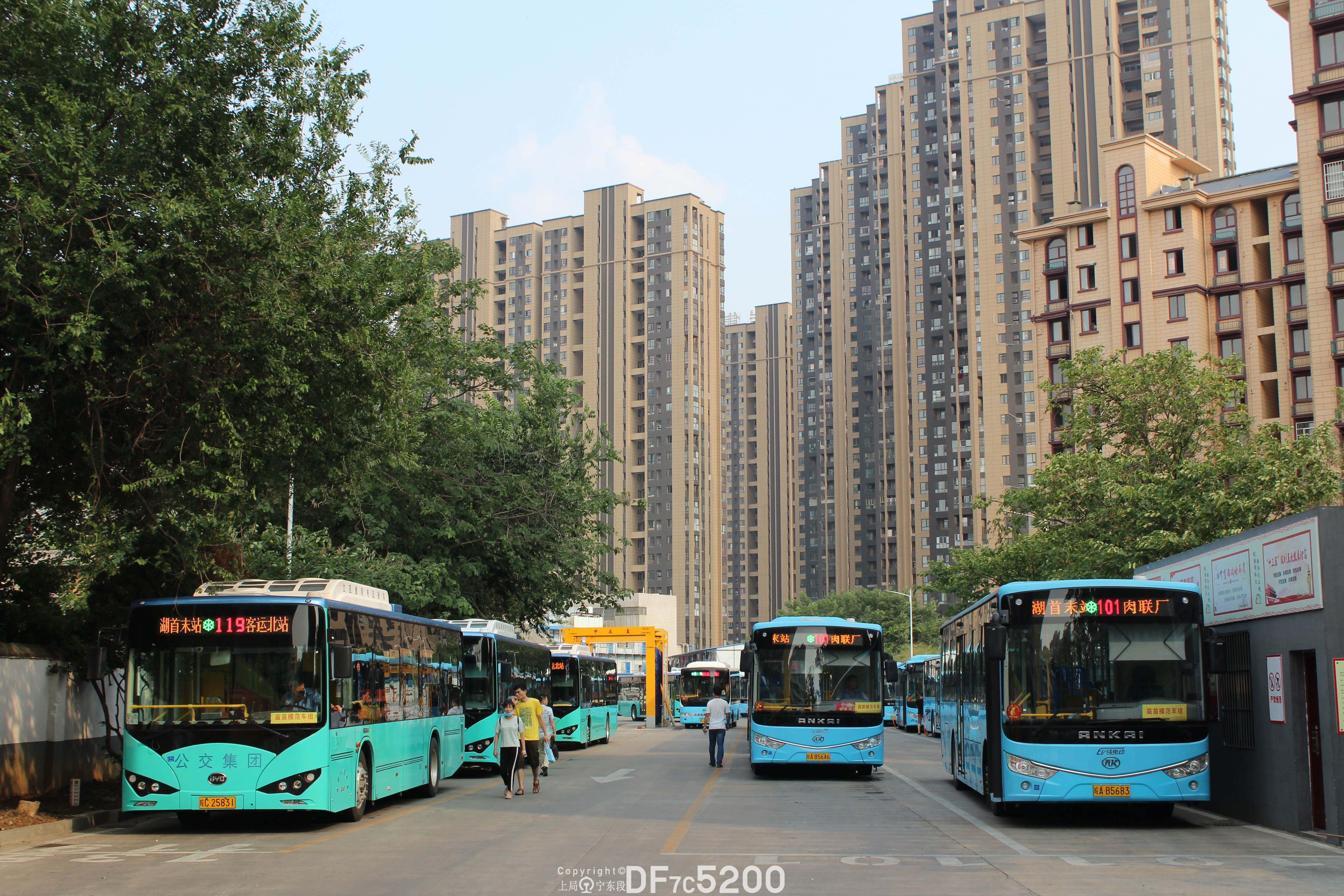 中文（中国大陆）: Bengbu Bus Zhanggonghu Changing Station